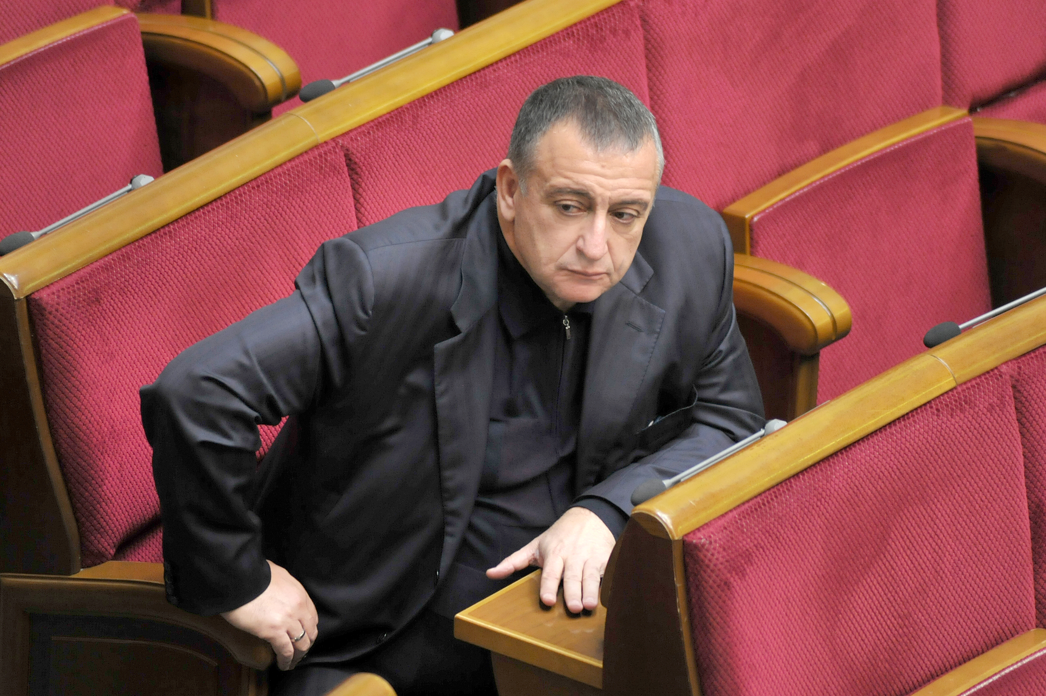 Oleksandr Presman 2017 Пресман Олександр Семенович, Украина